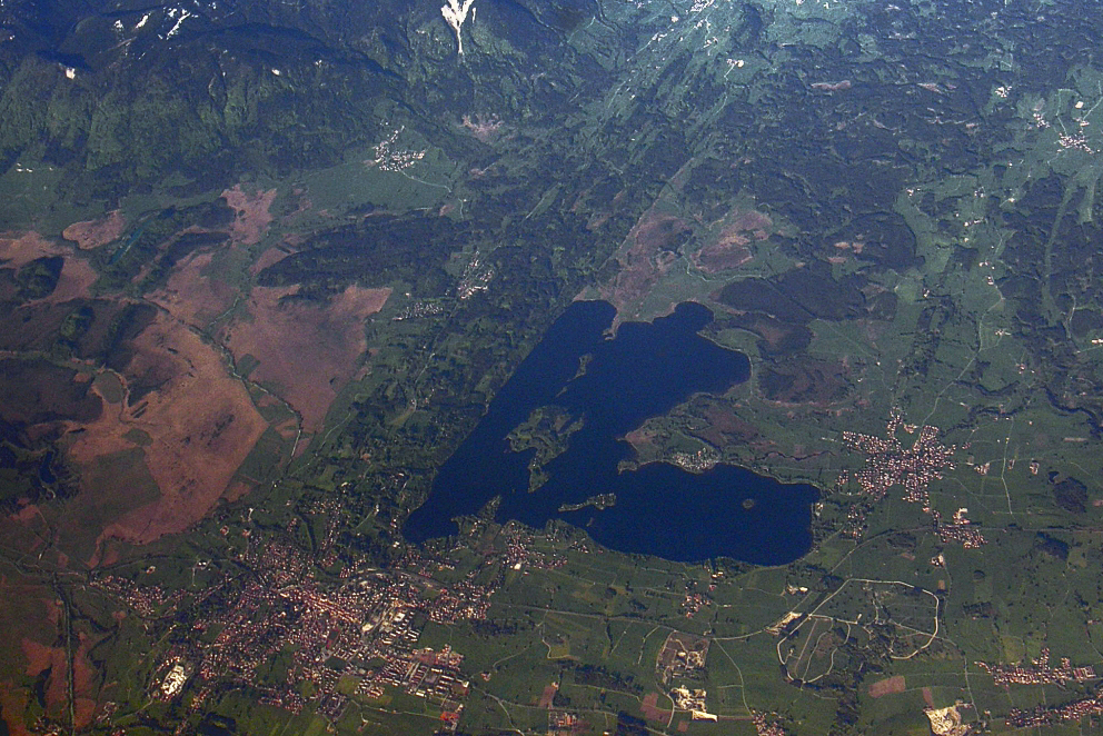 Staffelsee, Luftbild aus Bayern